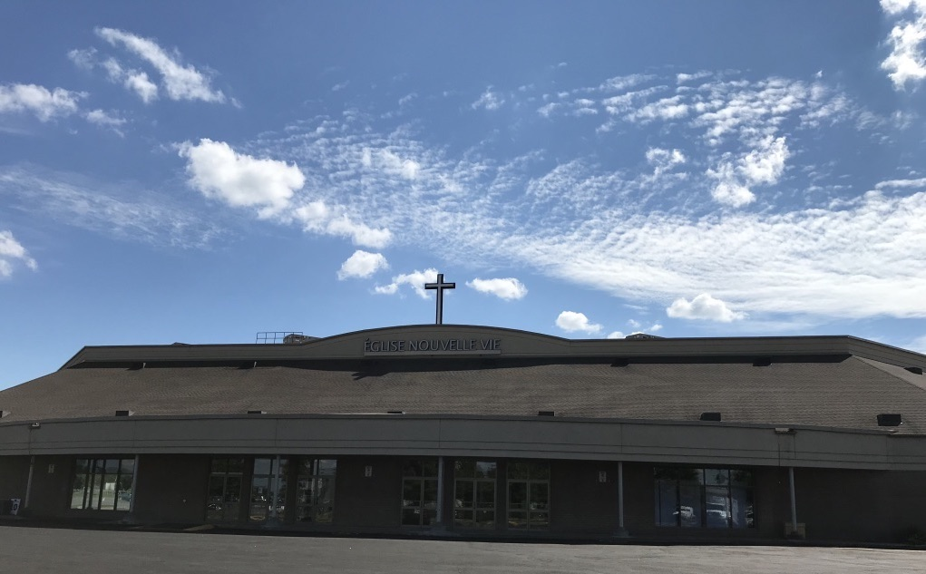 Église Nouvelle Vie de Longueuil, entrée principale